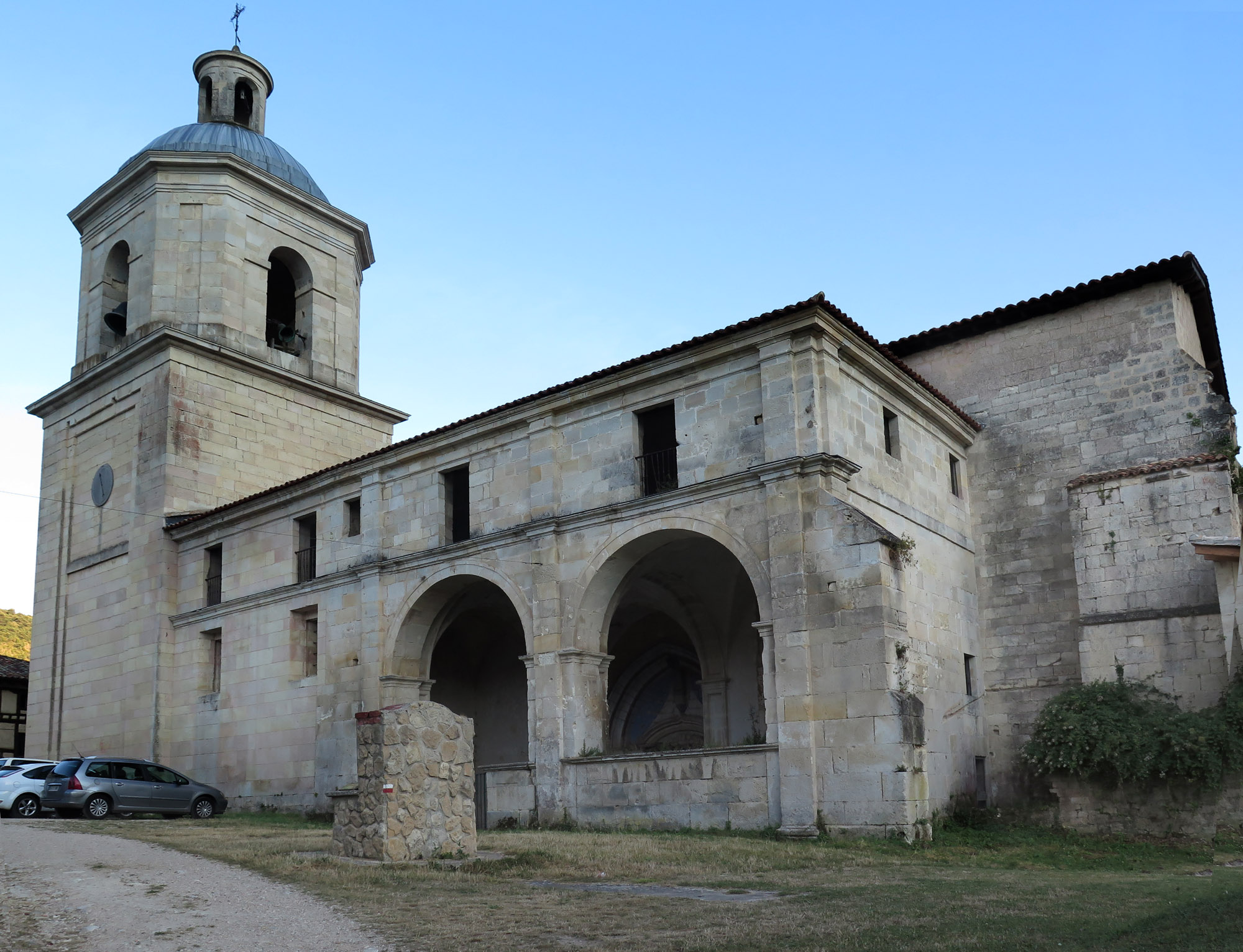 Colegiata de Valpuesta (Berberana, provincia de Burgos), en el valle de Valdegovía